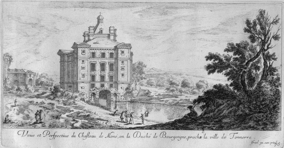 Château de Maulnes, Yonne - gravure d'Israël Silvestre